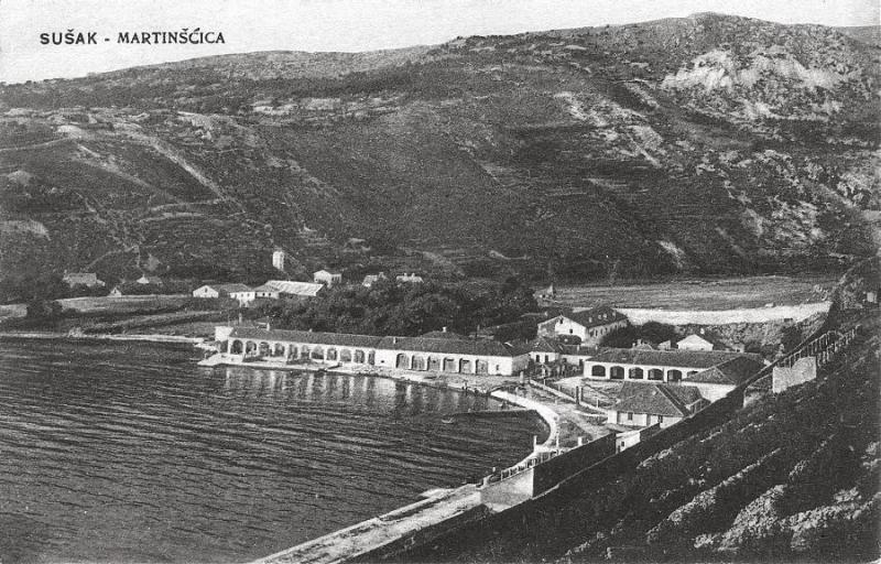 martinšćica, nekad